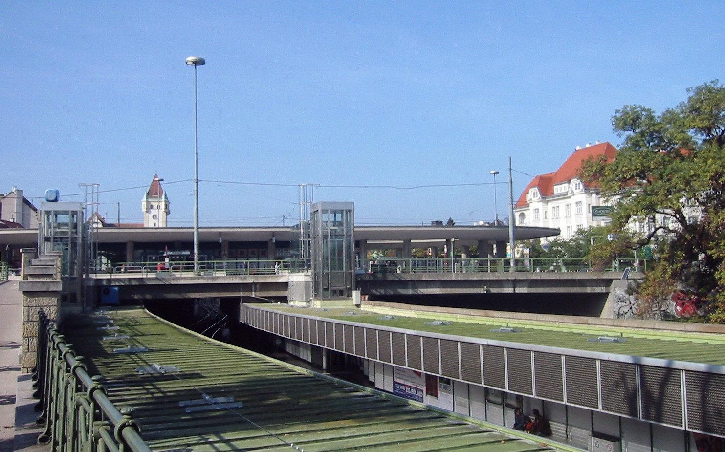 Wien, Kennedybrücke über den Wienfluss